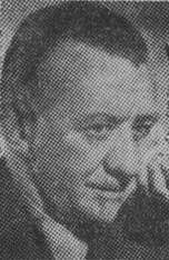 Nils Olsson